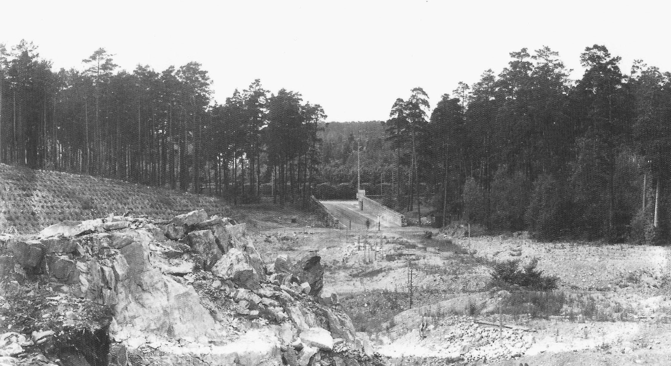 Berget som sprängdes bort och blev till sten för muren